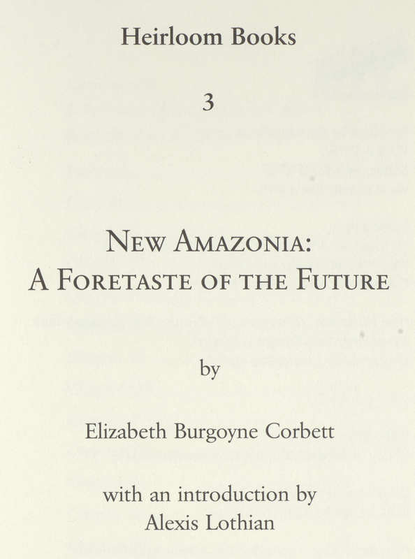 Nova Amazònia: un futur anticipat. segona edició